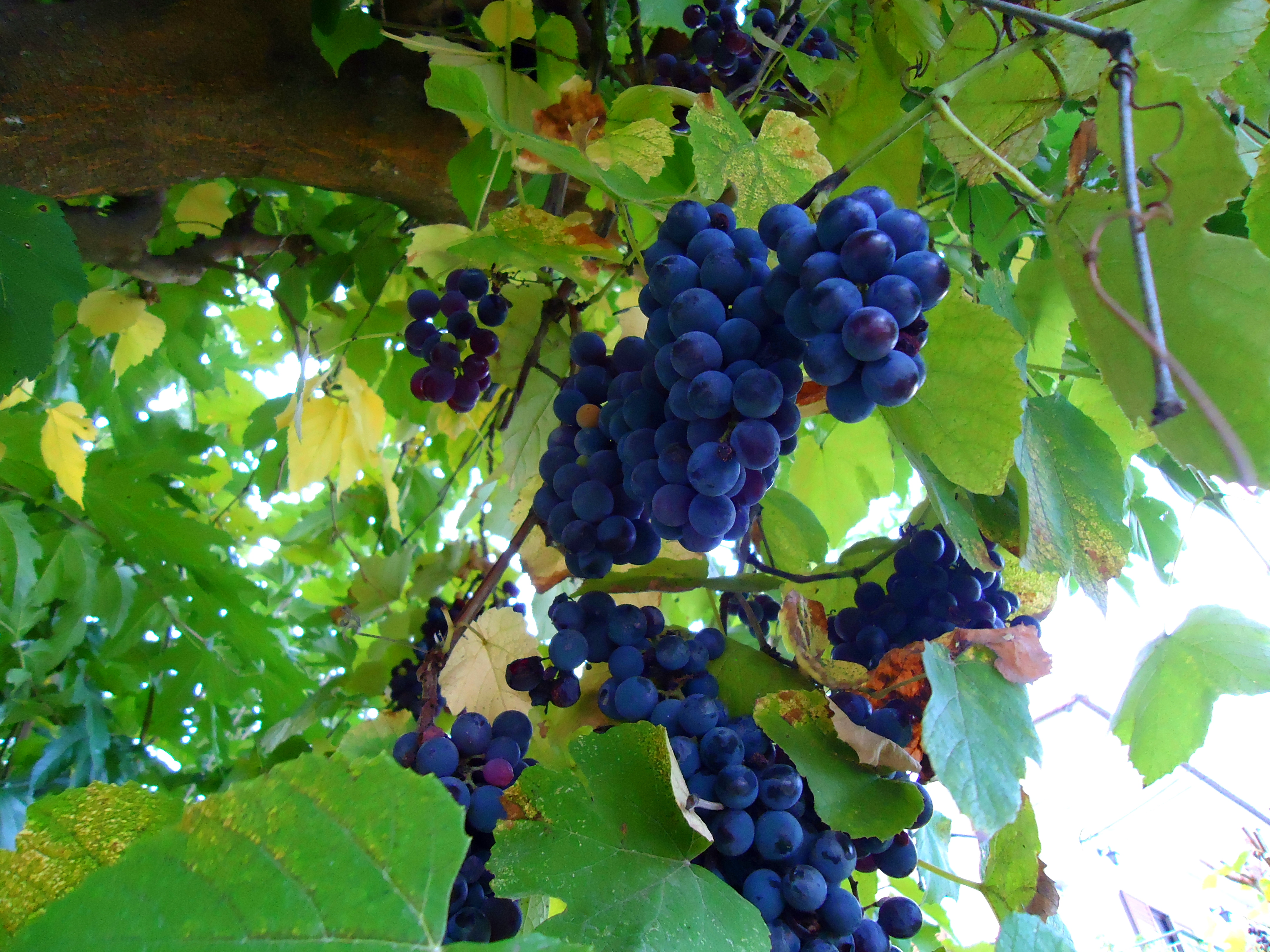 Η ζαμπέλα ή Ιζαμπέλα είναι ένα υβριδικό σταφύλι της κατηγορίας Vitis labrusca, ιδιαίτερα ανθεκτικό και γευστικό και είναι ιδανικό για την παραγωγή τσίπουρου αλλά αντίθετα δεν ενδείκνυται για παραγωγή κρασιού. Έχει χρώμα σκούρο κόκκινο ή μαύρο και θεωρείται αγριόκλημα. Στην Ελλάδα απαντάται κατά κύριο λόγο στην περιοχή της Άρτας.